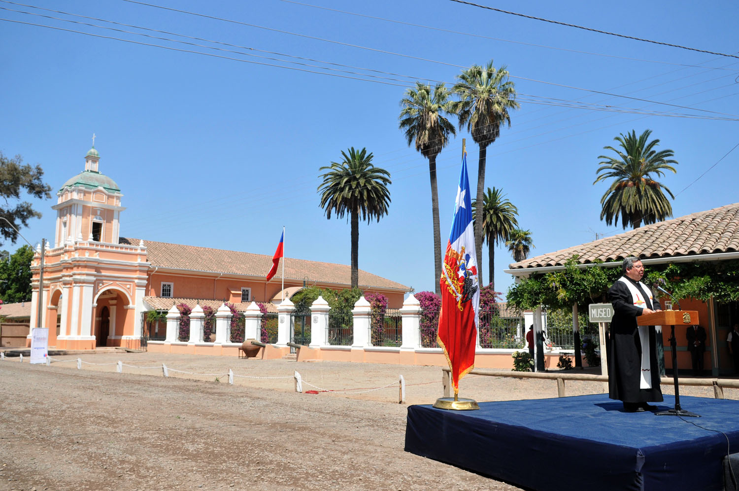 Consejo de Gabinete en Hacienda San José del Carmen de El Huique